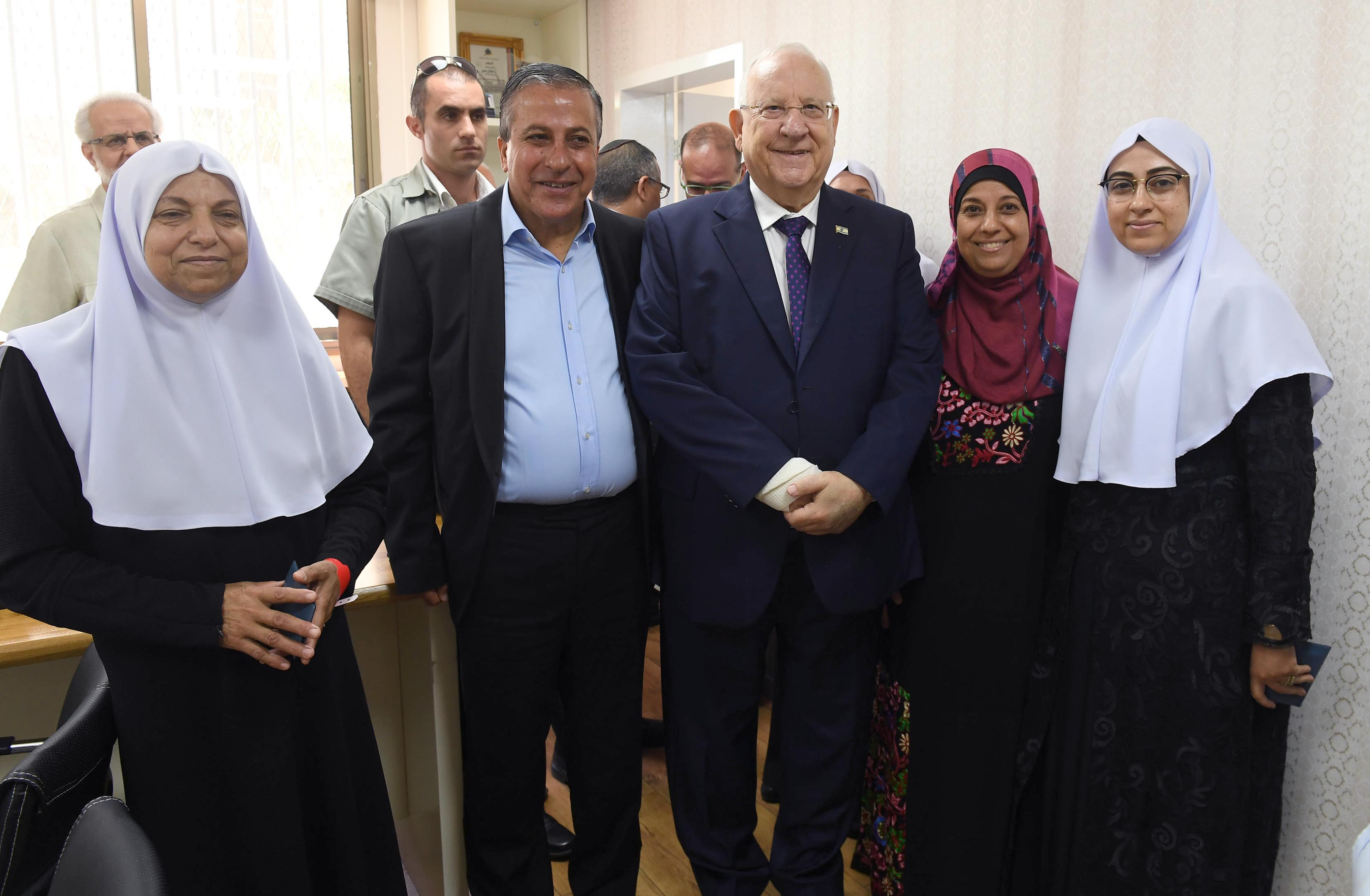 נשיא המדינה ראובן (רובי) ריבלין וראש העיר כפר קאסם, עאדל באדר, עם נציגות ממועצת הנשים של הכפר